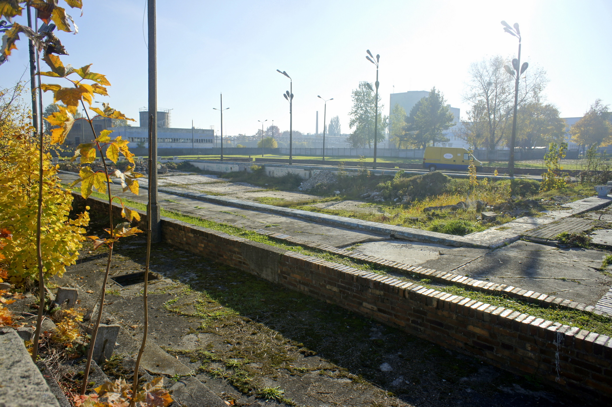 Gorzów Wlkp. Basen pływacki przy ul. Energetyków, wybudowany w połowie lat 70 XX w., obecnie w ruinie. Dzięki podgrzewanej wodzie basen był eksploatowany przez cały rok. Trenujący na nim gorzowscy waterpoliści byli przez kilkanaście lat czołową drużyną w kraju.